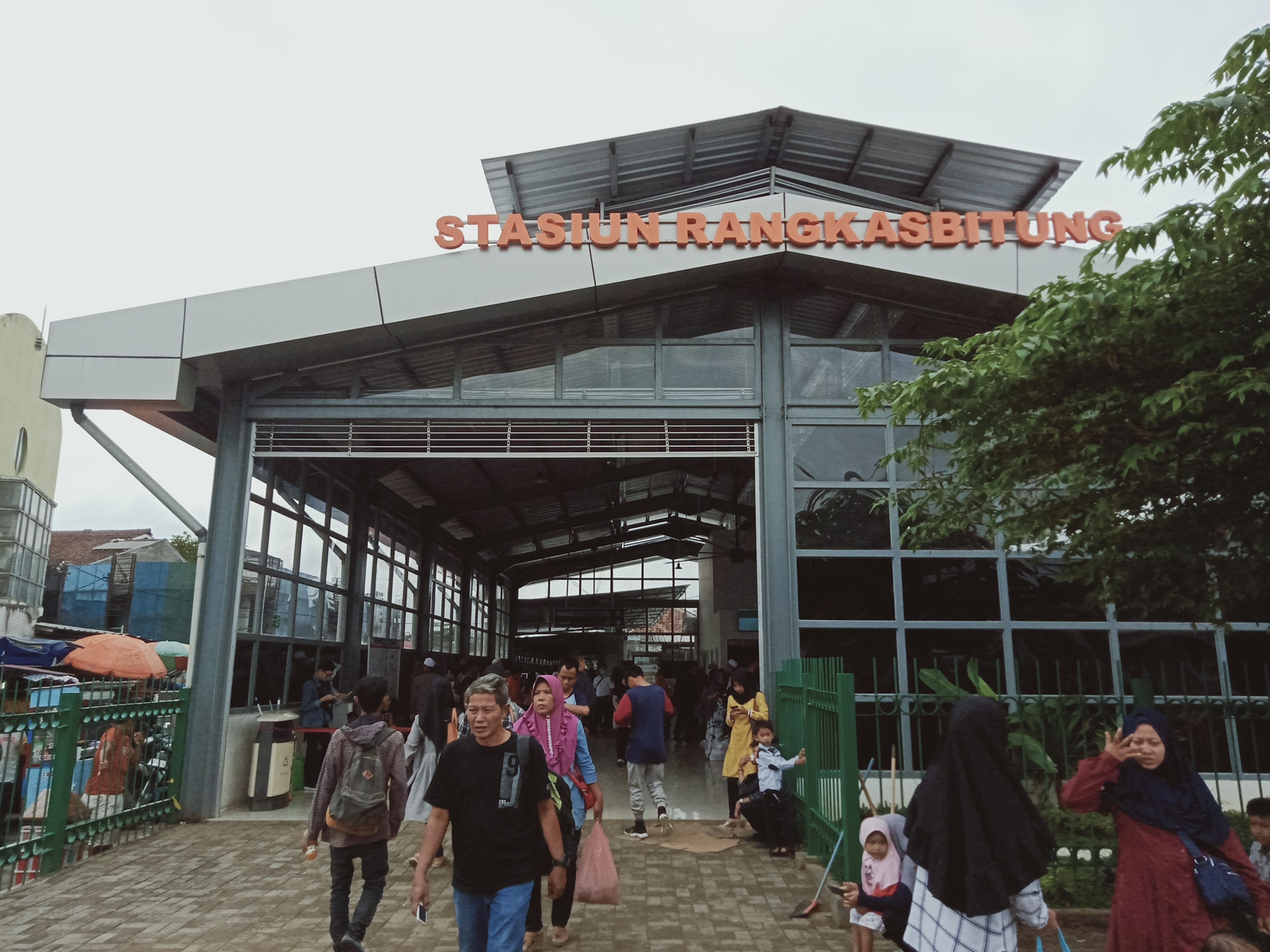 Pintu masuk Stasiun Rangkasbitung yang dikhususkan untuk KRL Commuter Line